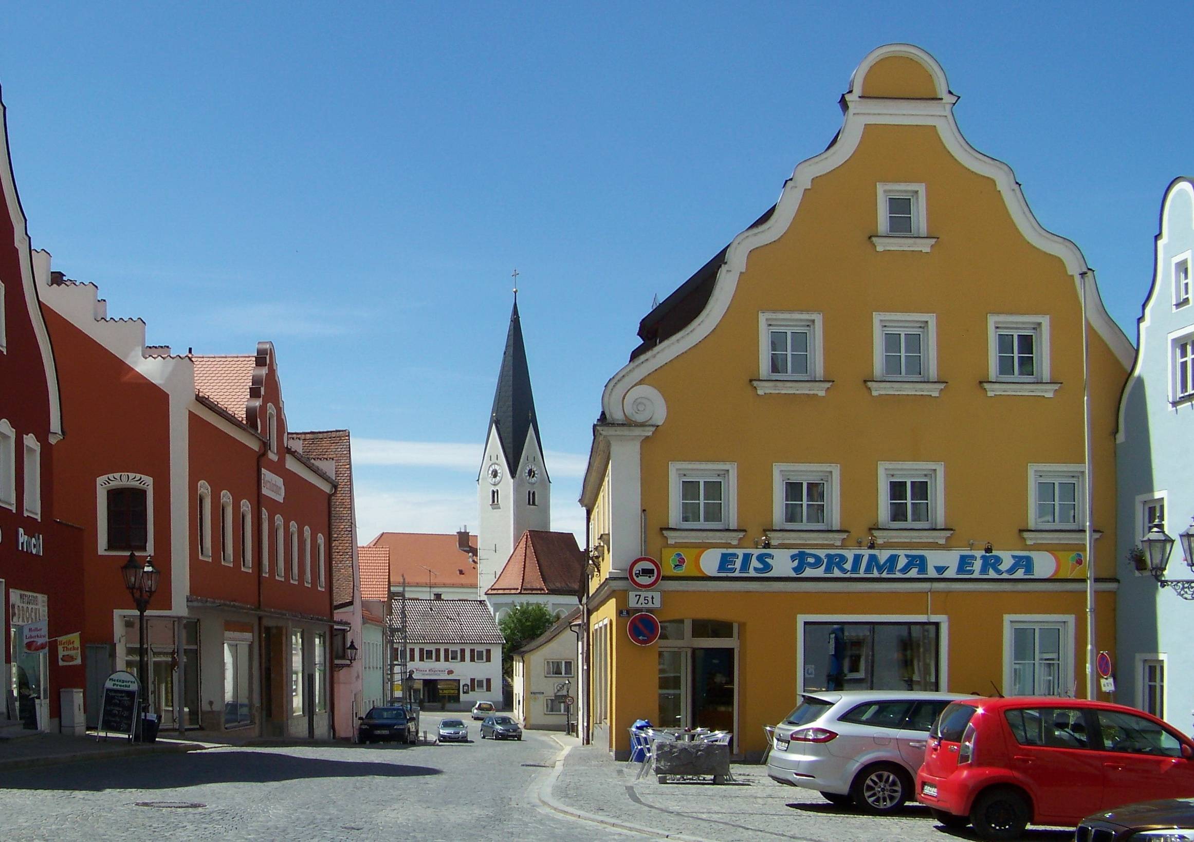 Geiselhöring, Stadtplatz 2, Bürgerhaus neben dem Rathaus, mit Schweifgiebel, 2. Hälfte 19. des Jahrhunderts. Im Erdgeschoss Eisdiele.